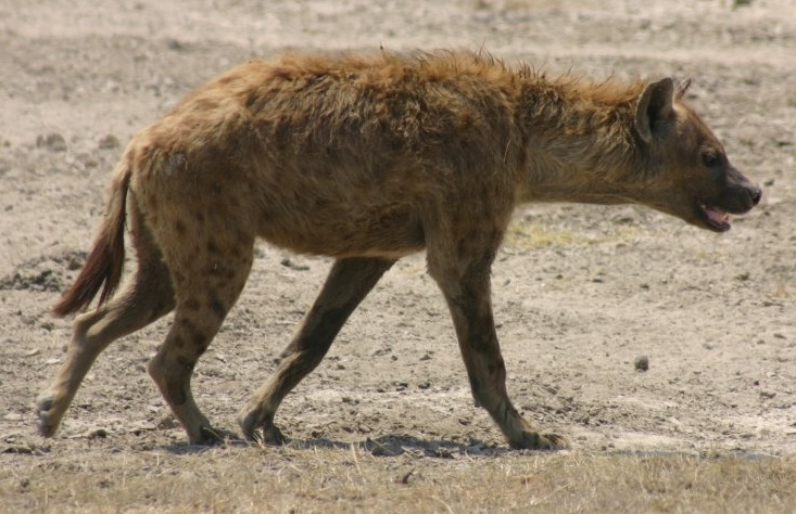 Spotted hyena side view